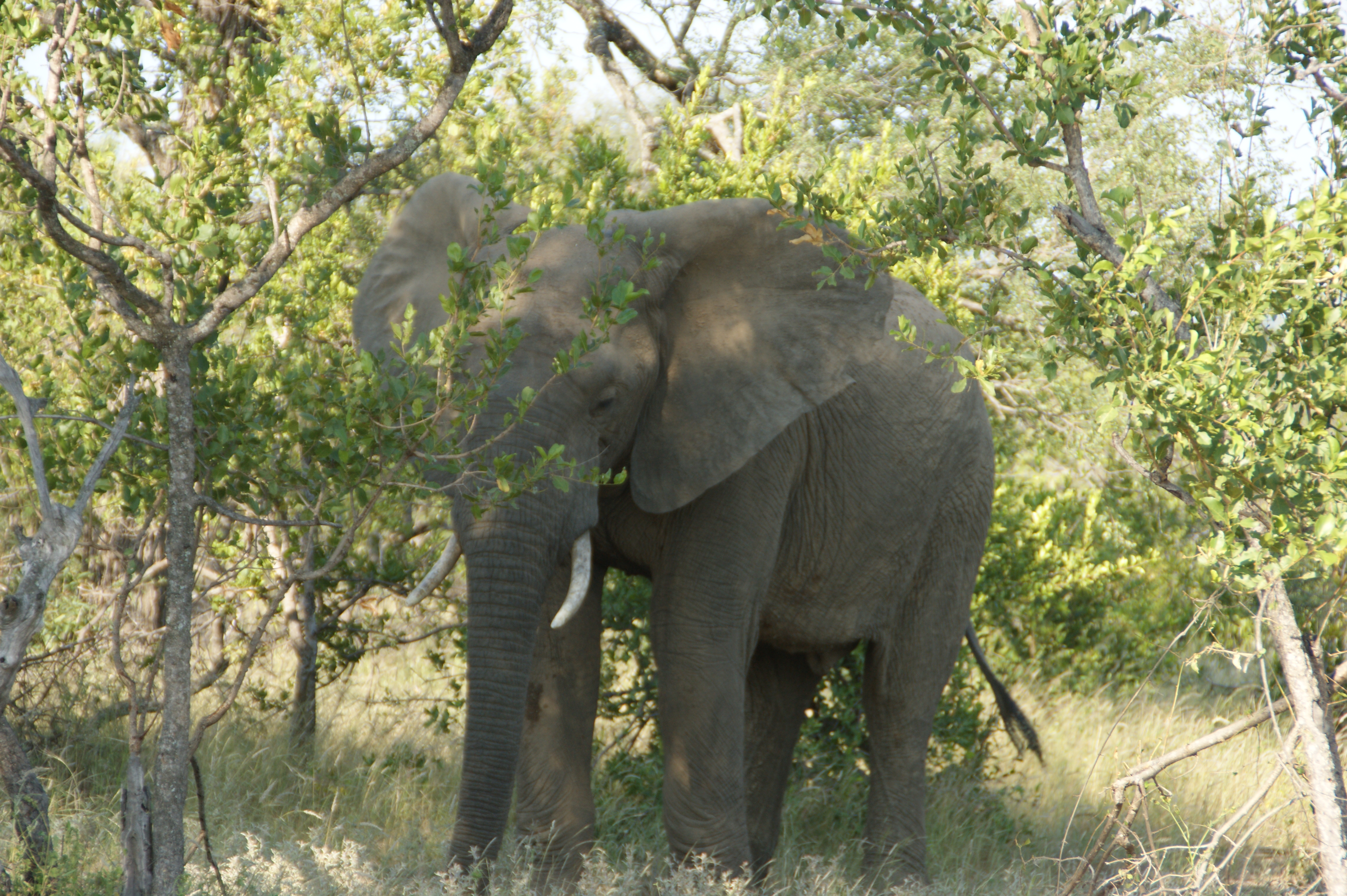 De Afrikaanse olifant in het Balule Nature Reserve, Zuid-Afrika